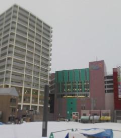 青森駅前の再開発が行われた施設